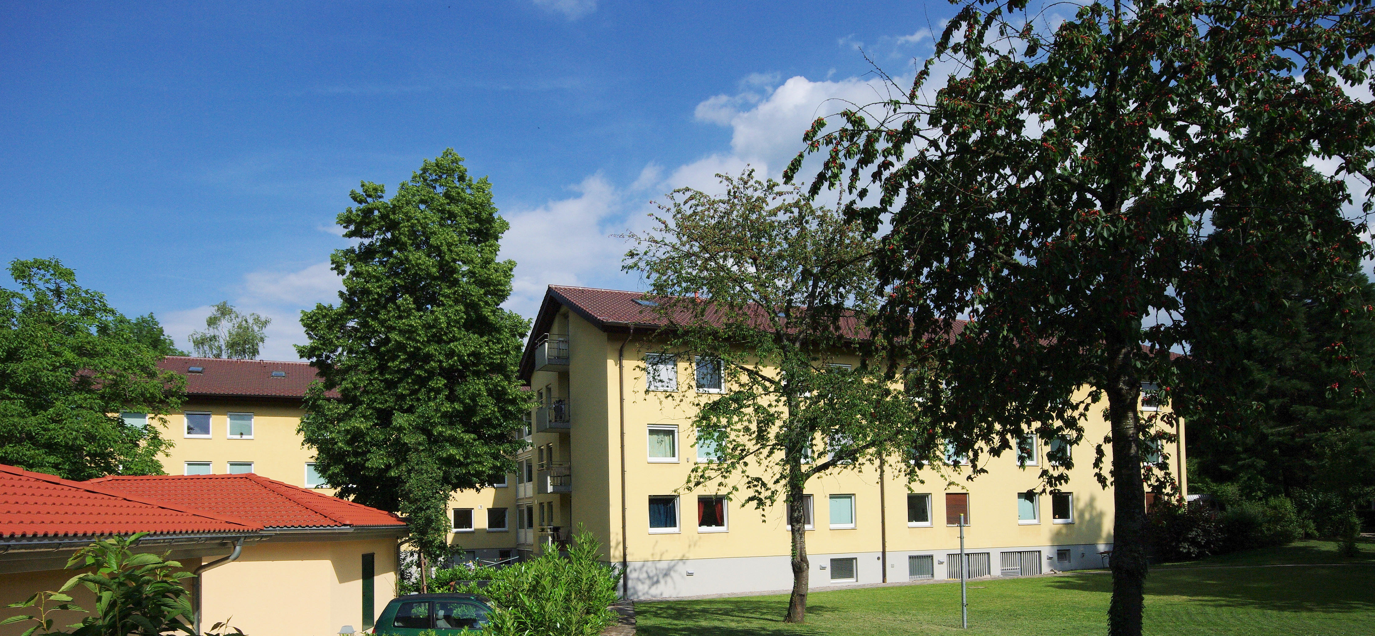 Das Collegium Sapientiae (lat., „Kolleg der Weisheit“), auch Sapienz genannt, ist das älteste Studentenwohnheim in Freiburg im Breisgau.